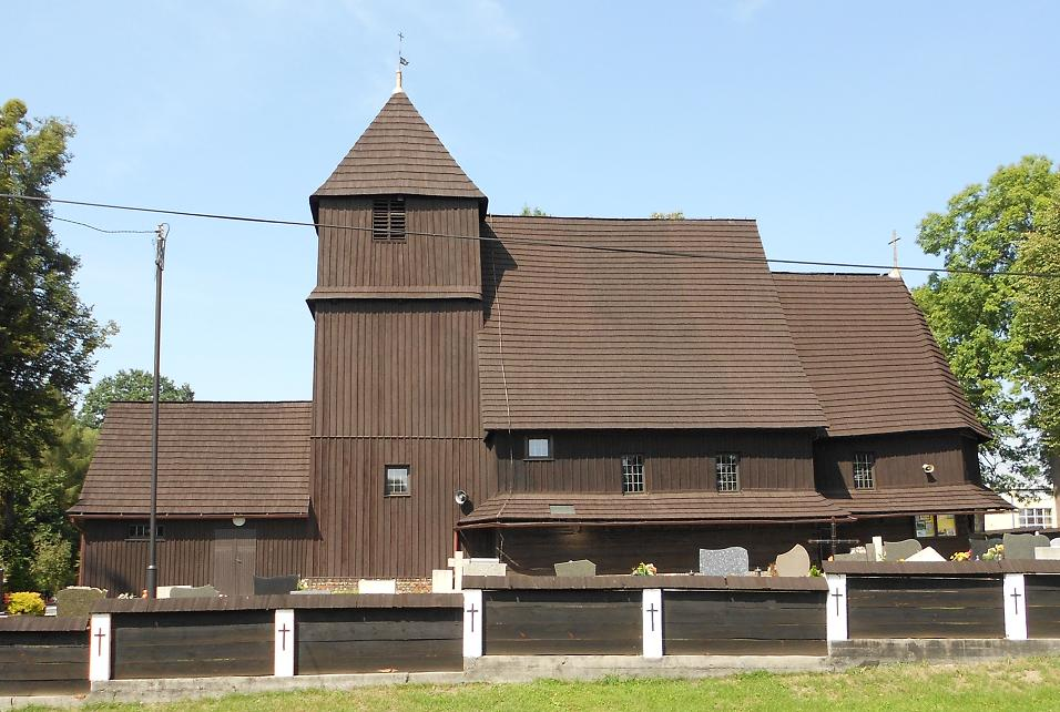 Kościół drewniany p.w. św. Michała Archanioła, Rudziniec